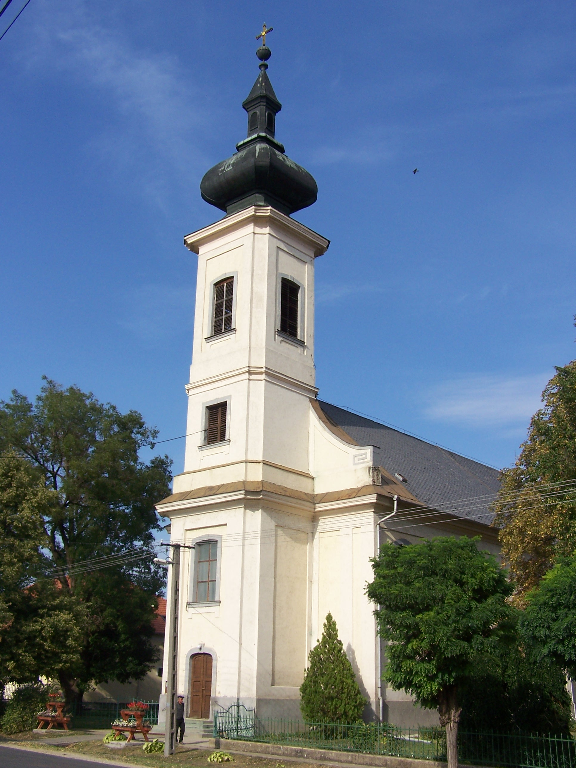 Római katolikus templom (Mezőkeresztes, Keresztespüspöki, Szentistváni u. 68 /A.) This is a photo of a monument in Hungary, Identifier: 2897